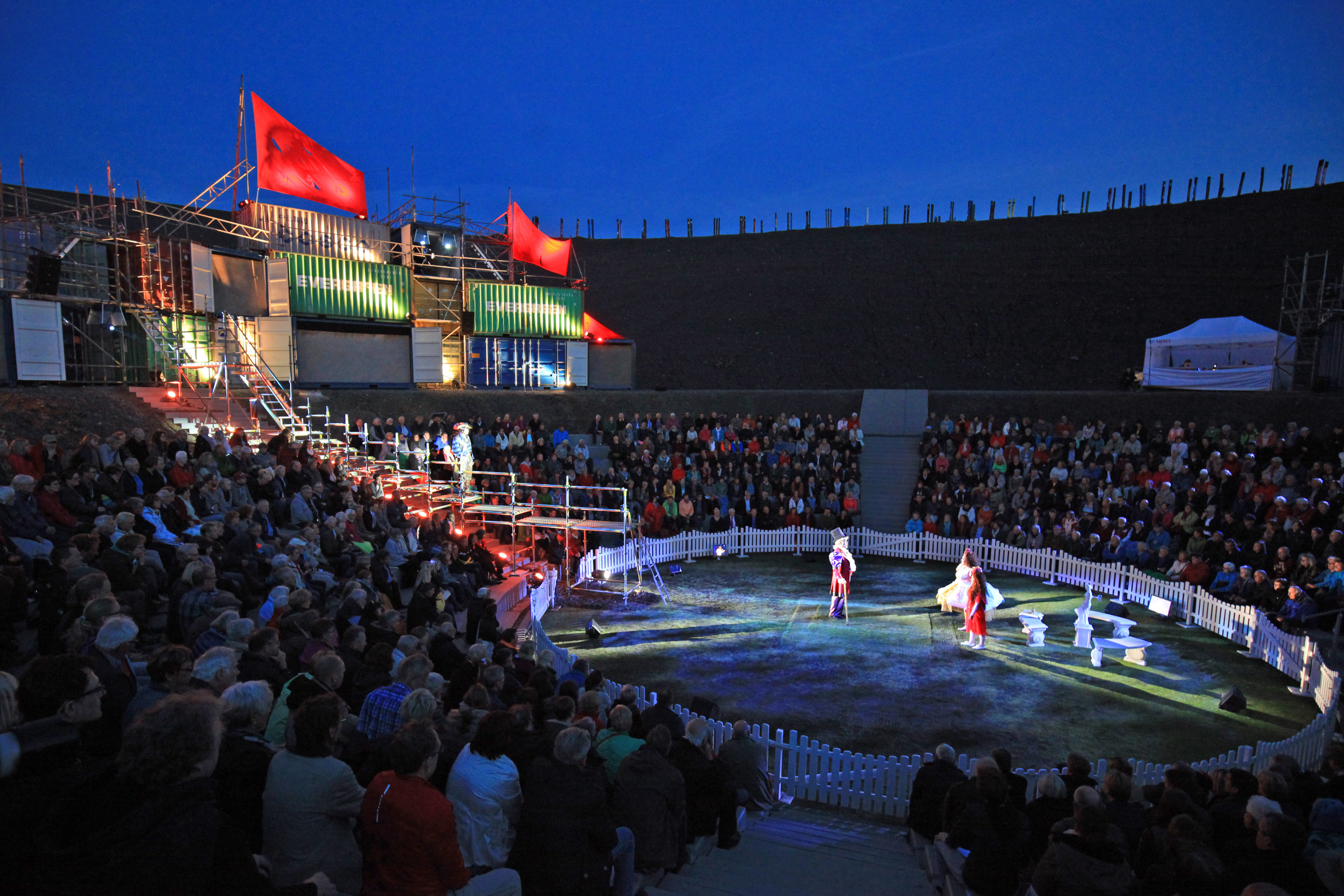 Szenenfoto "Der Fliegende Holländer", Stadt Bottrop, Wagner